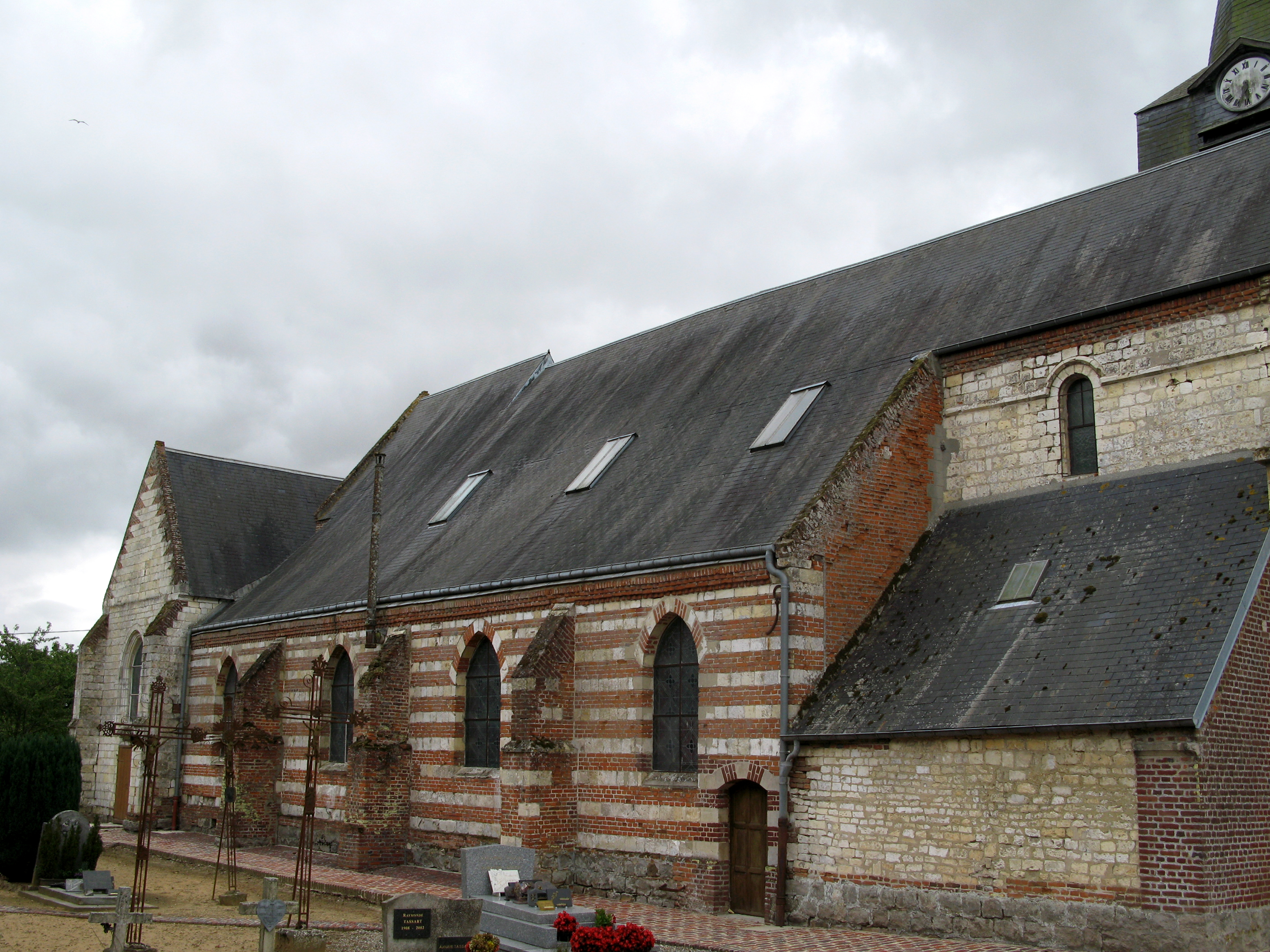 Beaufort-en-Santerre (Somme, France) - L'église Notre-Dame de l'Assomption. . .